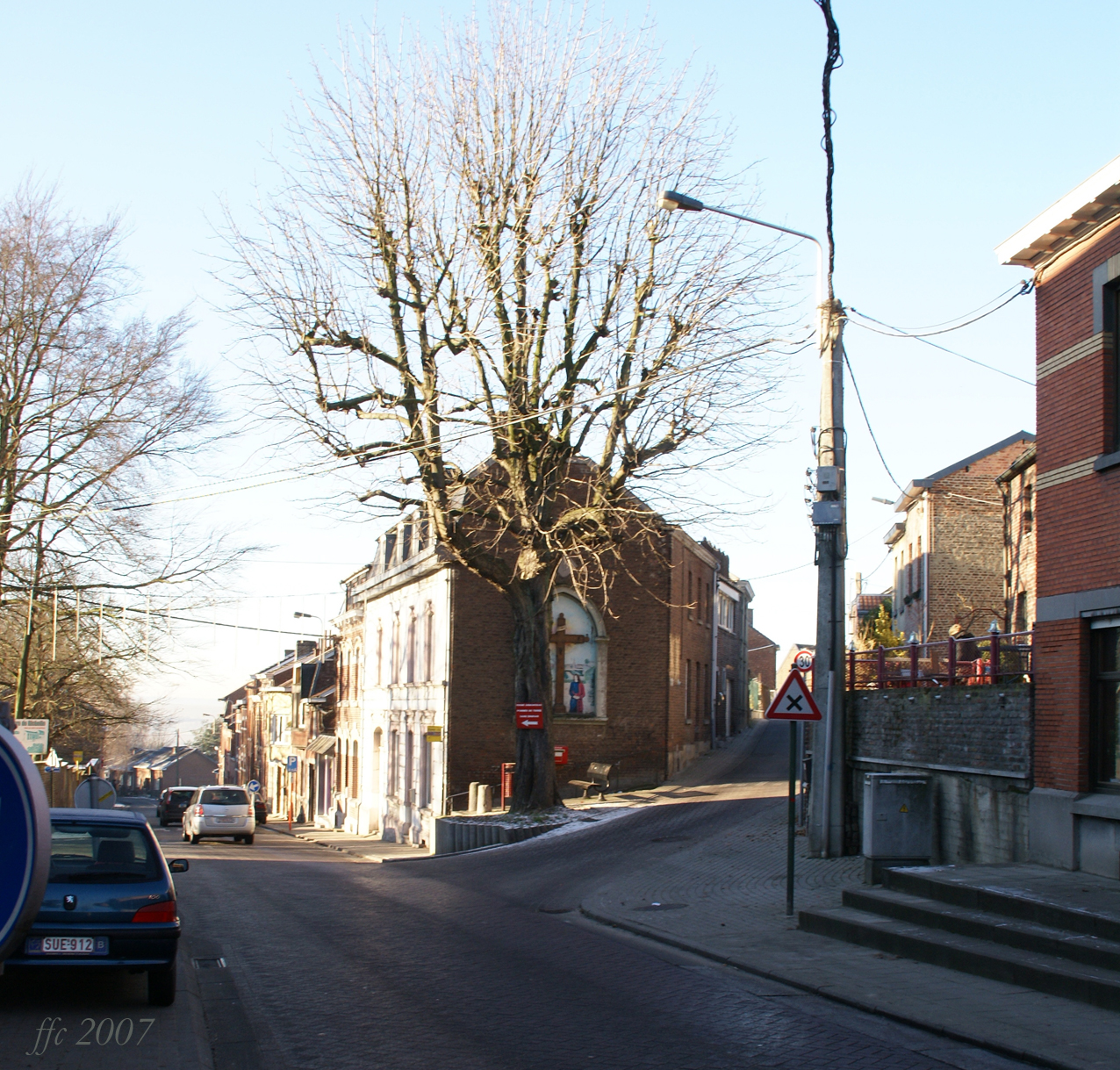 Richelle, rues de Richelle et de la Carrière